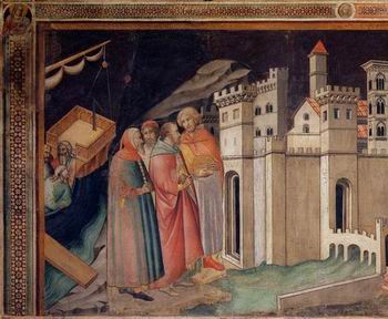 Il ritorno di Michele, agnolo gaddi, cathedral of prato